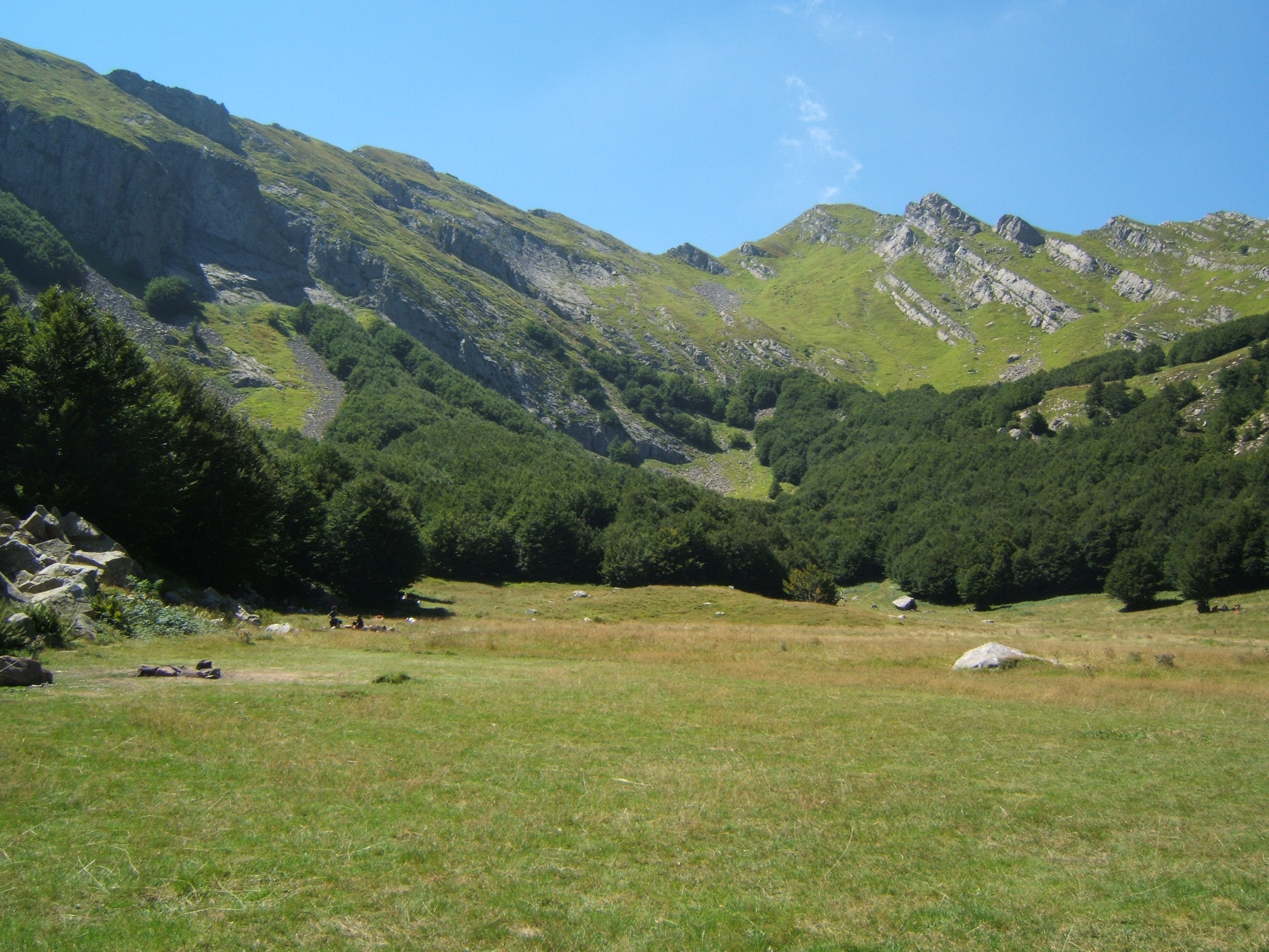 Le sorgenti del Fiume Secchia ai piedi dell'Alpe di Succiso (Reggio Emilia, Italy)